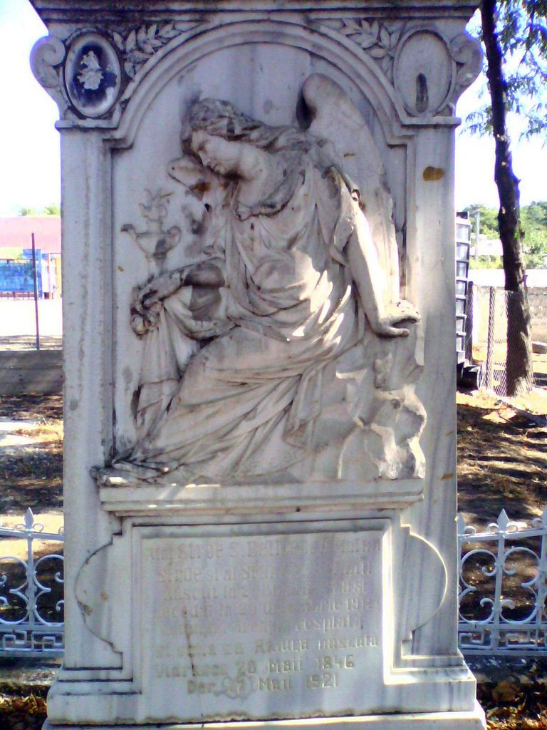 Mormântul său se află între cele două ctitorii ale sale din Griviţa - Vaslui: biserica şi şcoala